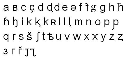 Адыгейский алфавит 1927-1938